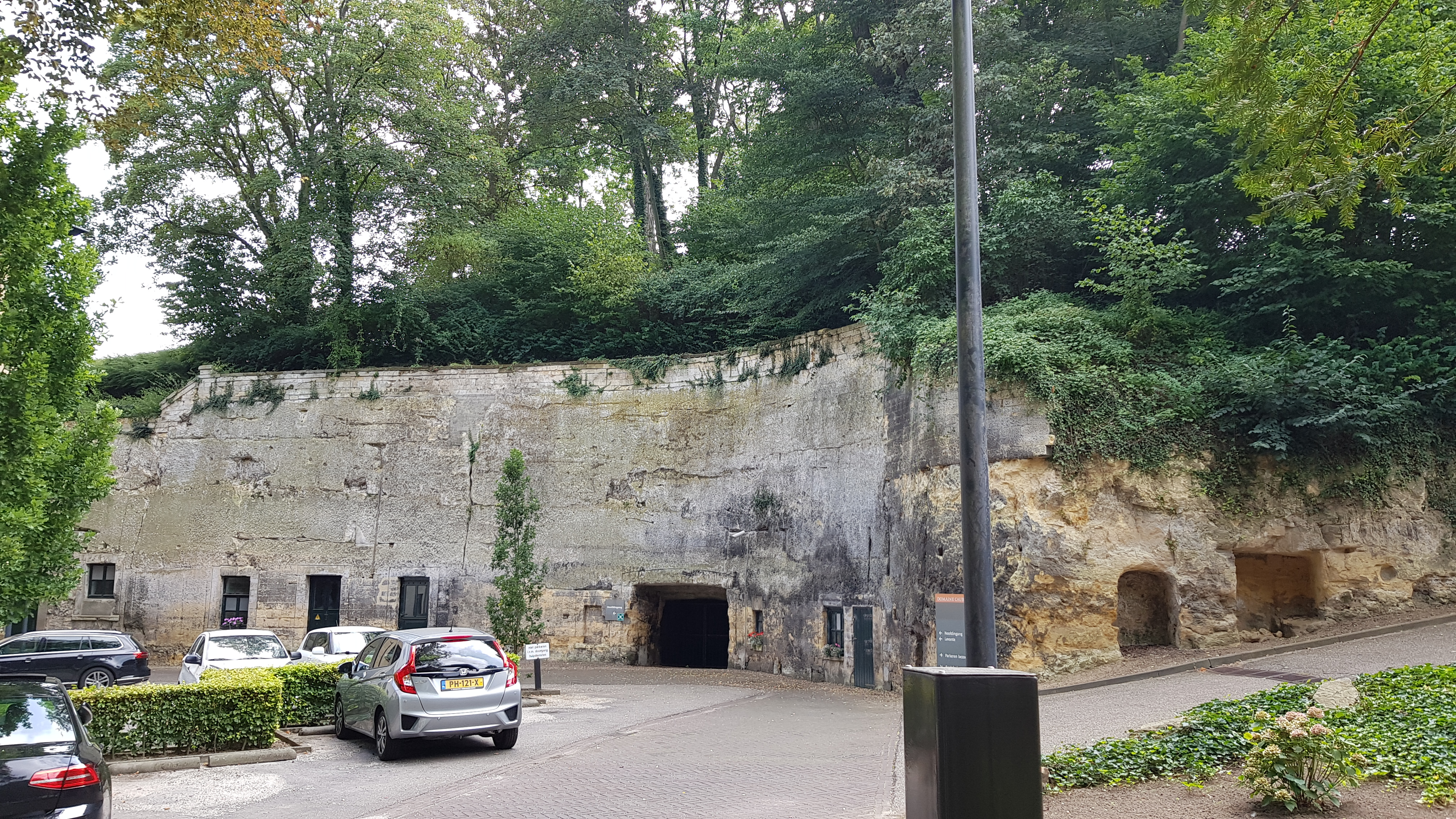 Heilig Hartgroeve, Valkenburg, Nederland